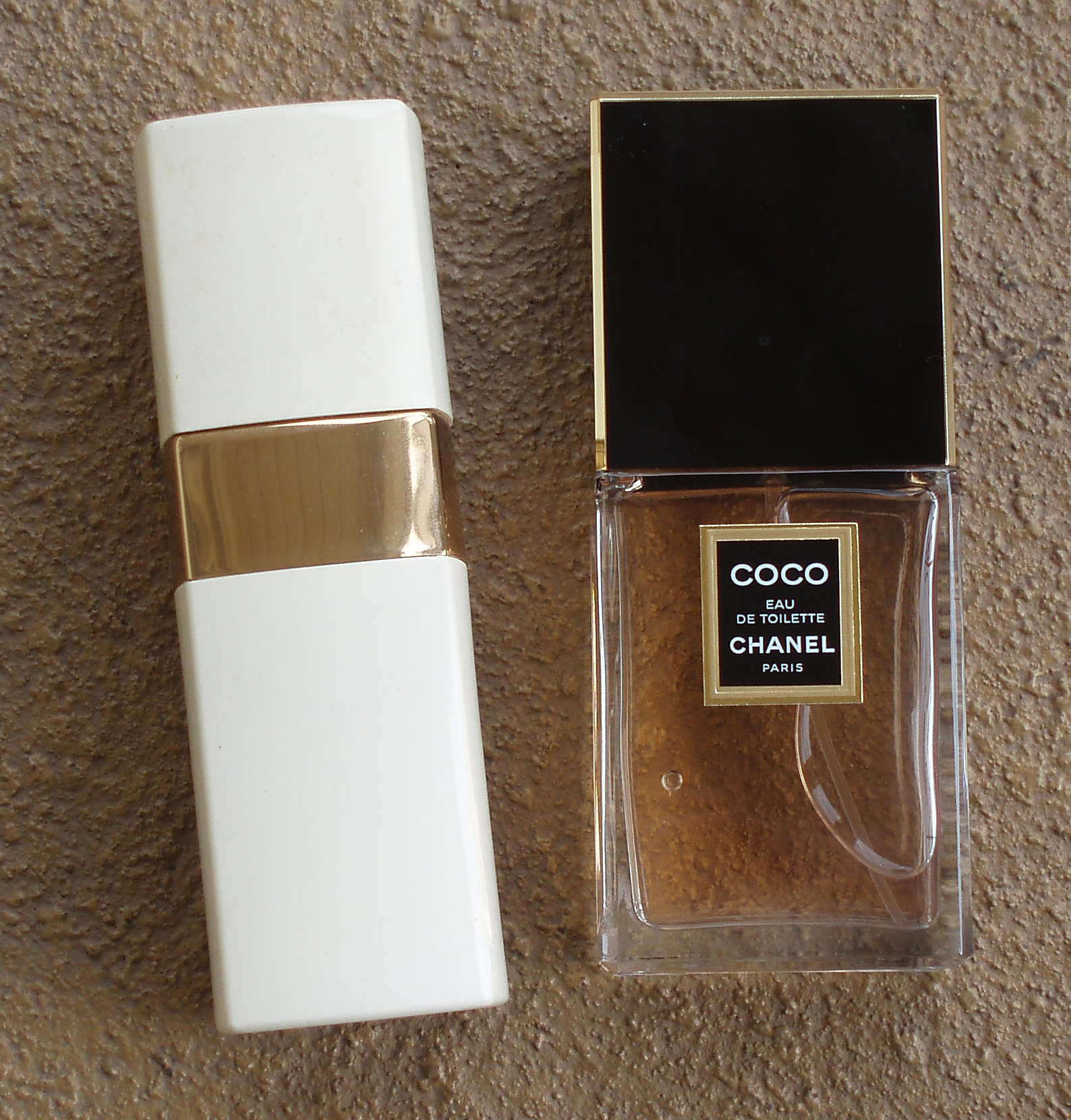 Parfum Coco de Chanel